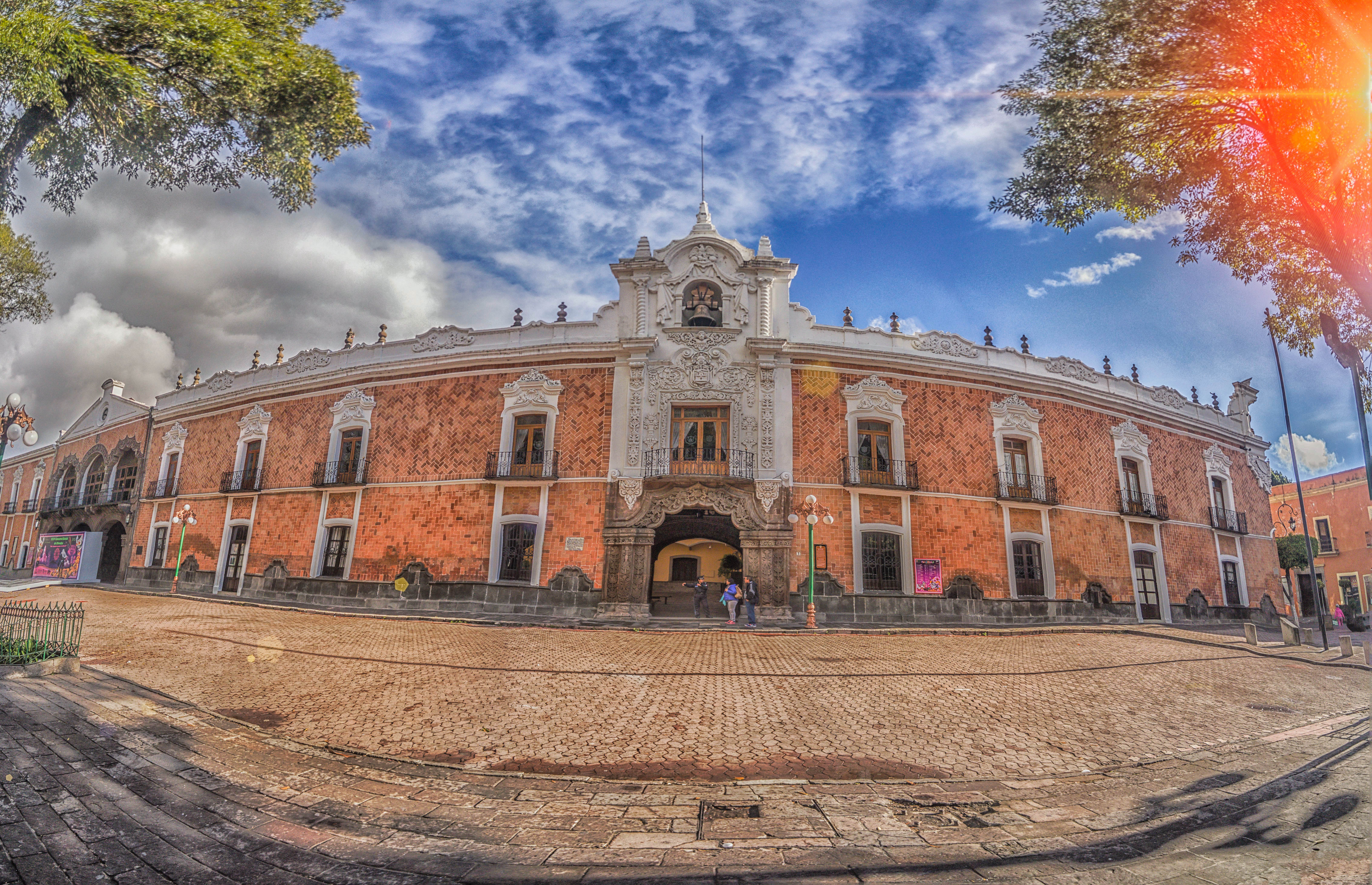 Palacio de Gobierno